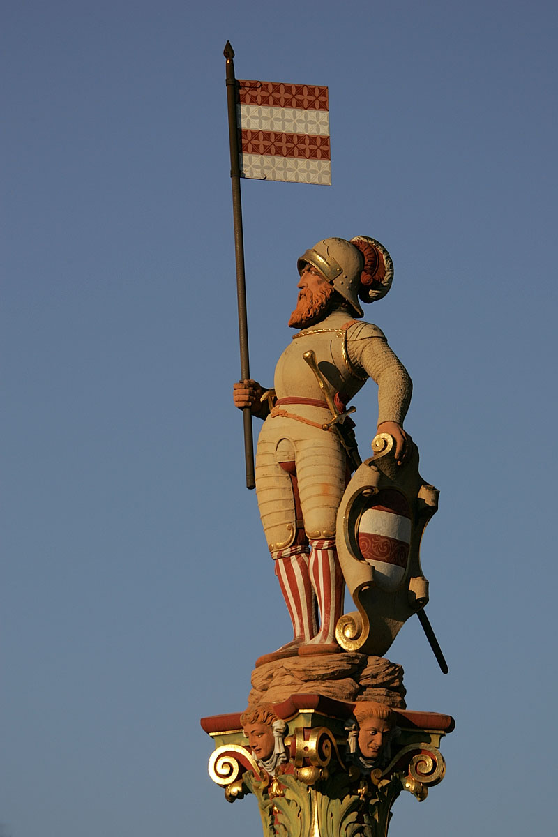 Brunnenfigur des Niklaus-Thut-Brunnens in Zofingen